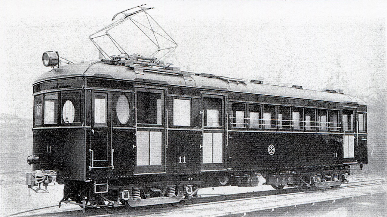 志摩電気鉄道10形11号車。製造元の日本車輌製造本店にて落成時に撮影された形式写真。